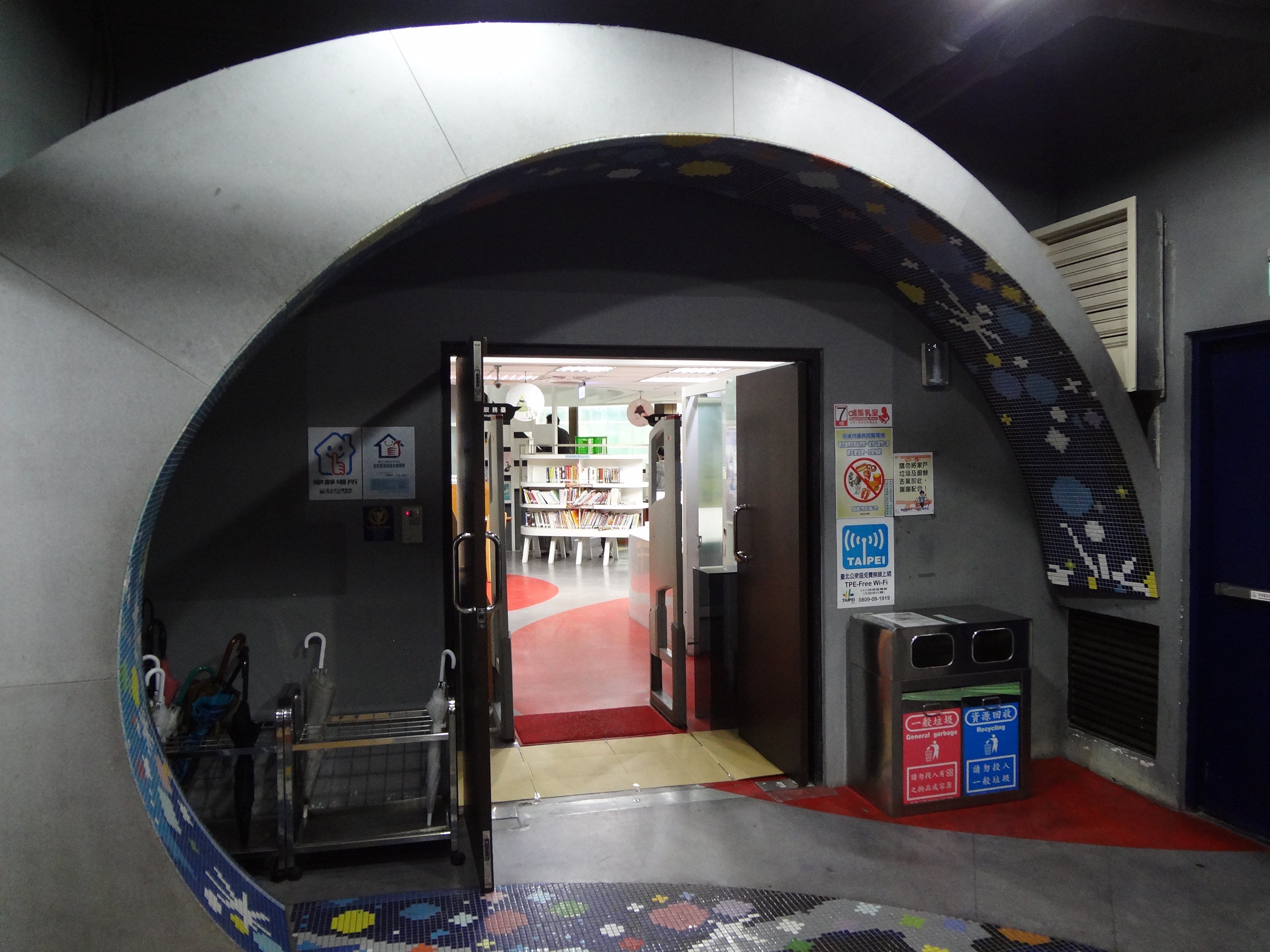 中文（台灣）: 臺北市立圖書館中崙分館8樓入口。